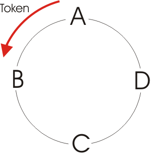 Tokenbus